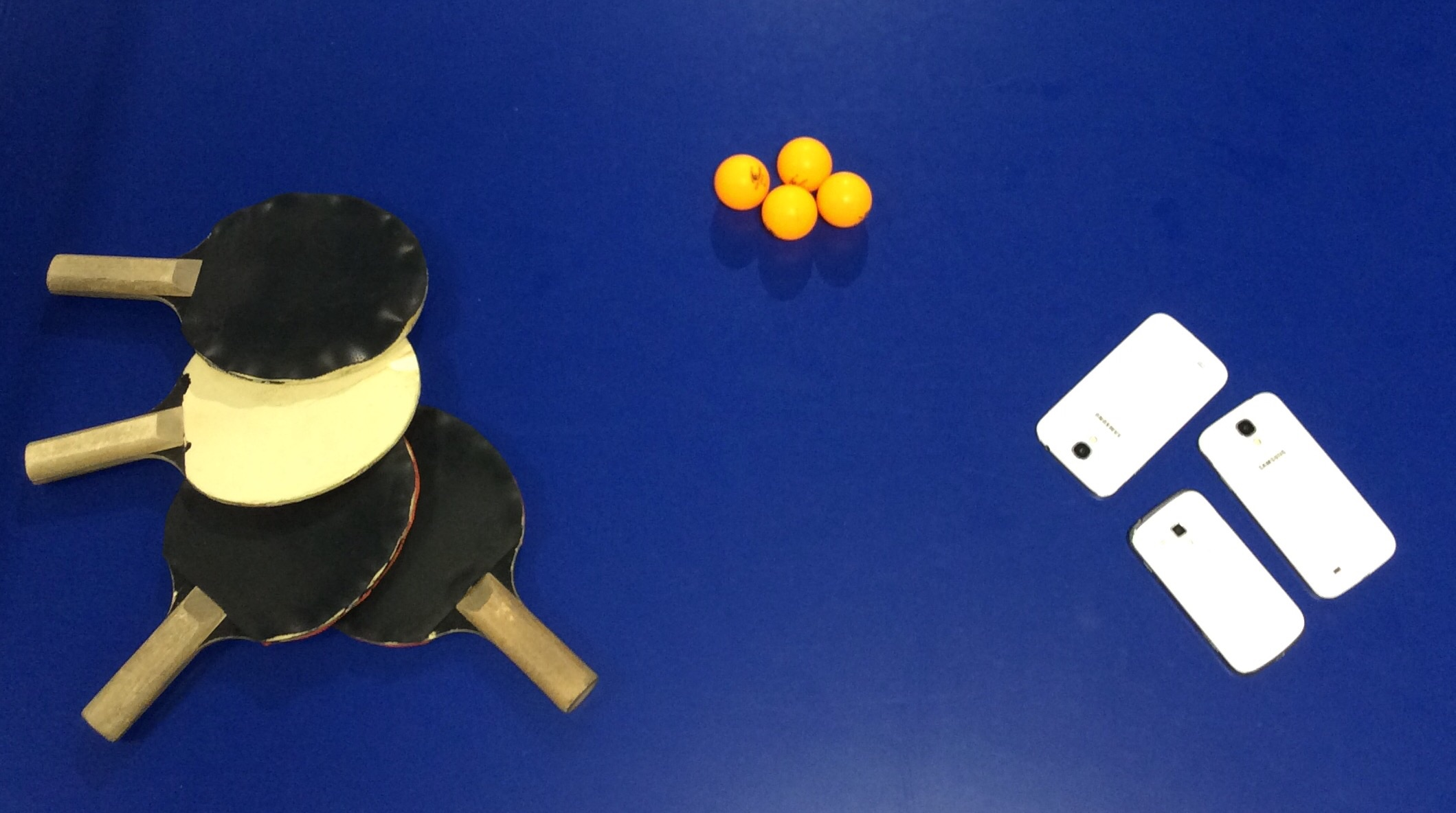 läheisyyden laki